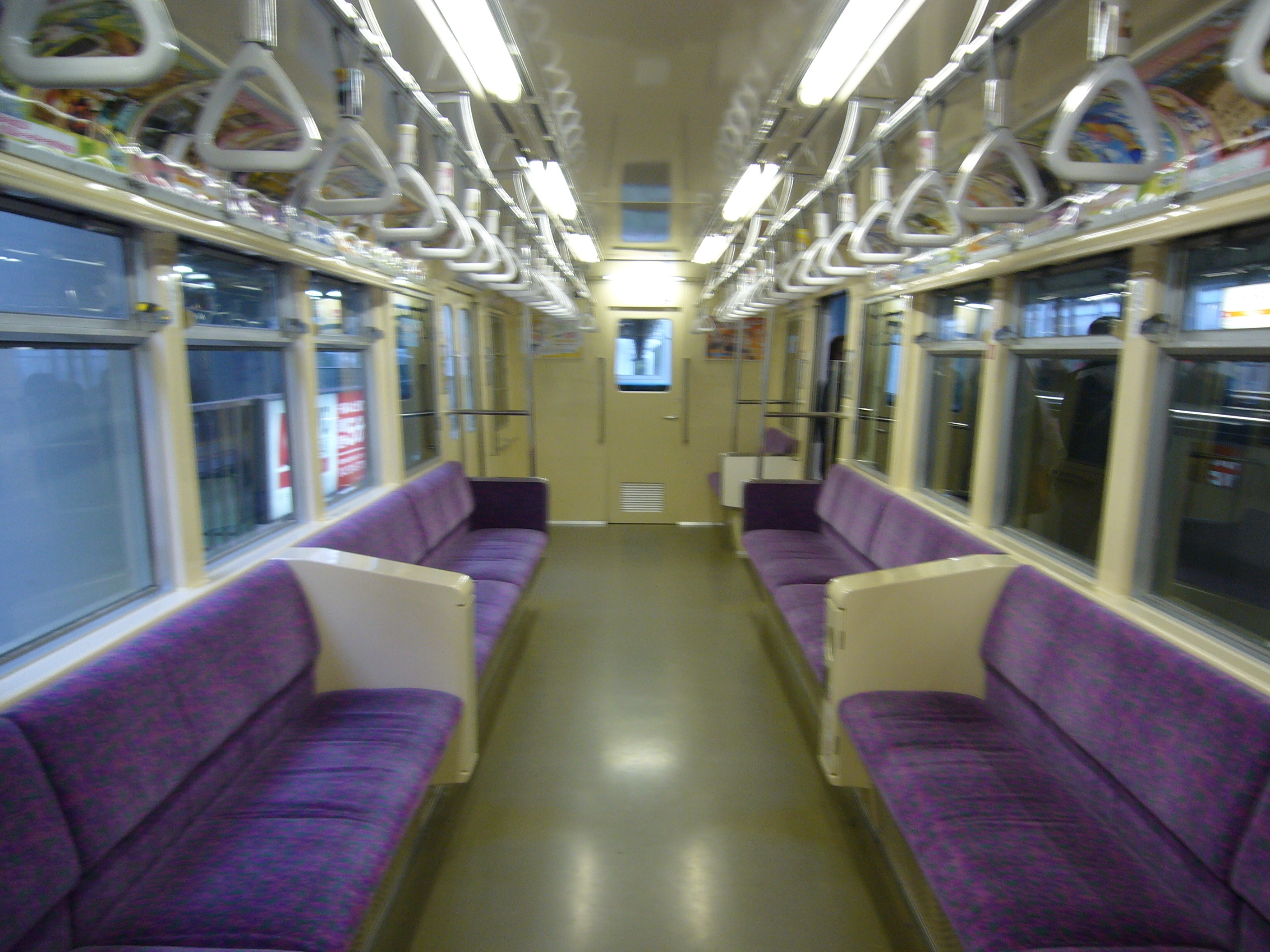 千葉都市モノレール1000形第19編成1038号車の車内写真です。 千葉みなと駅1番線にて撮影。